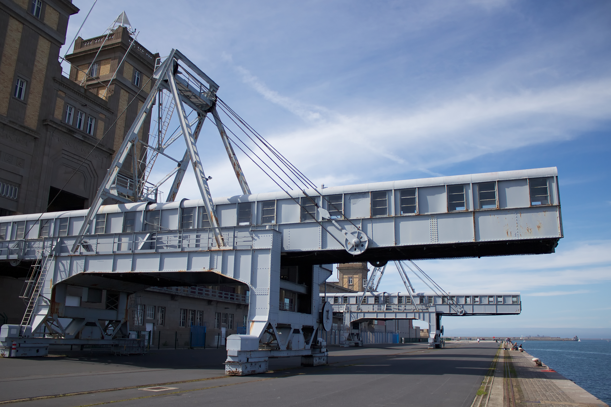 Quai de la gare transatlantique de Cherbourg